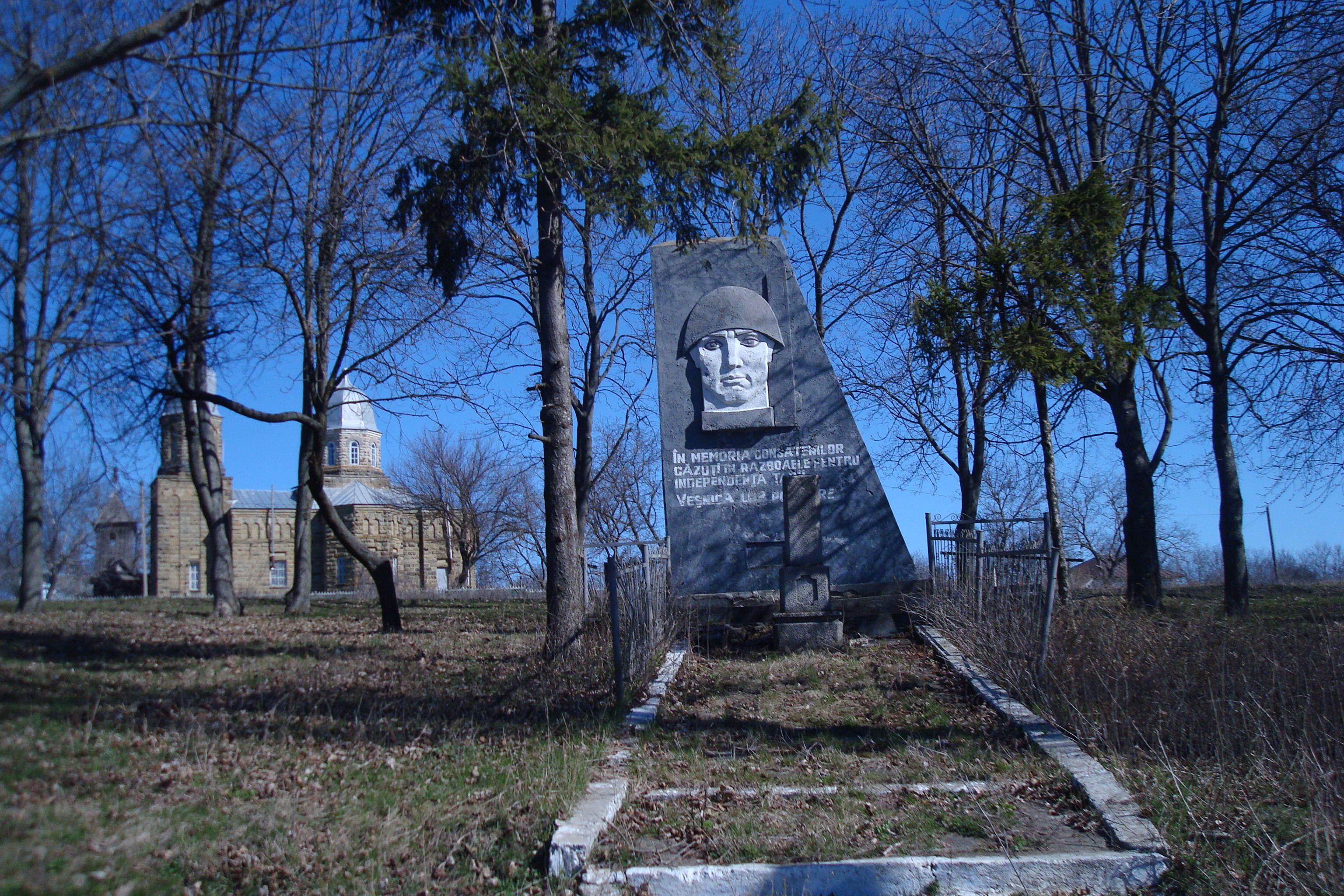 Monumentul în memoria consătenilor căzuţi pentru Independenta Tării